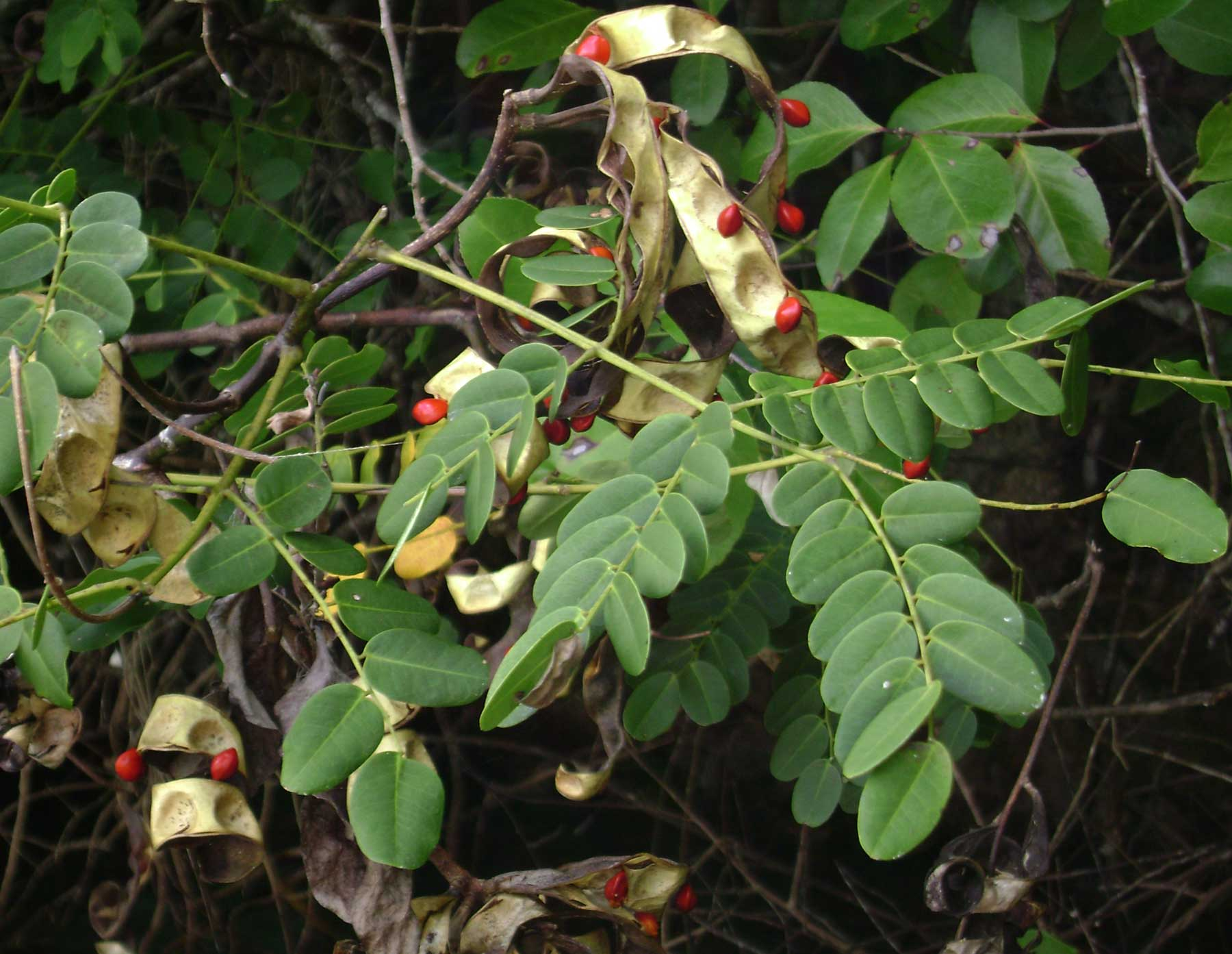 Adenanthera pavonina; (lopa), common in Vavaʻu (Tonga)